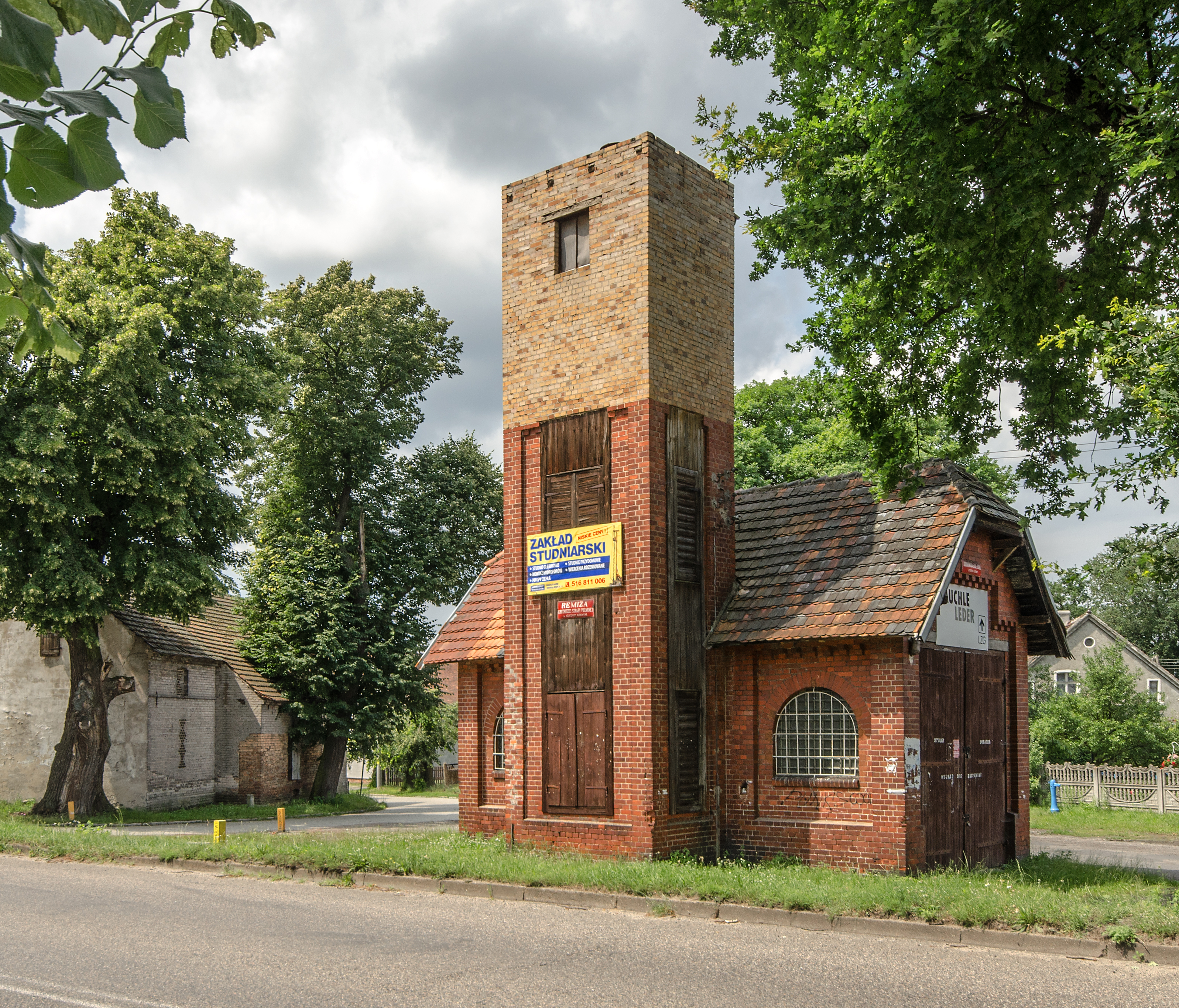 Remiza OSP w Lesznie Górnym, woj. lubuskie, pow. żagański, gm. Szprotawa